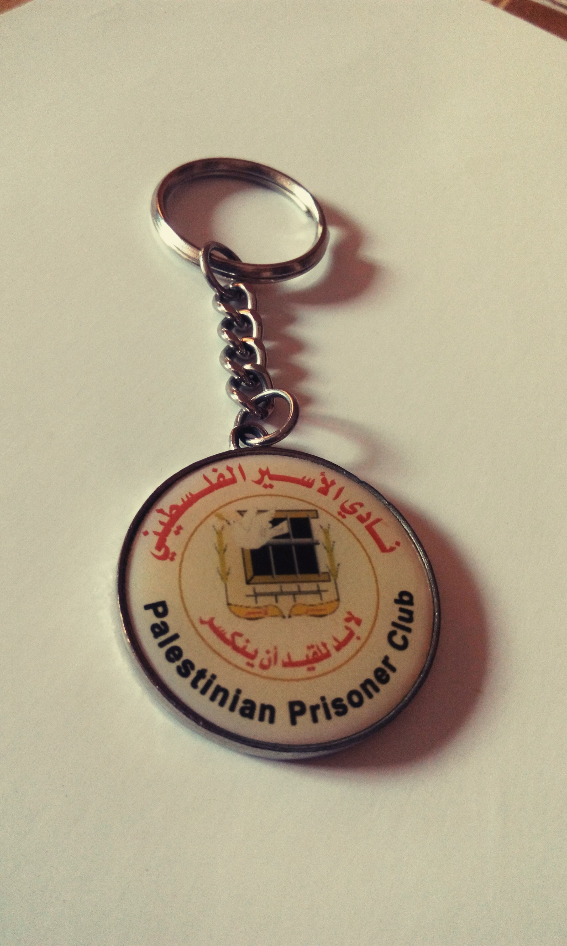 قِلادة جمعية نادي الأسير